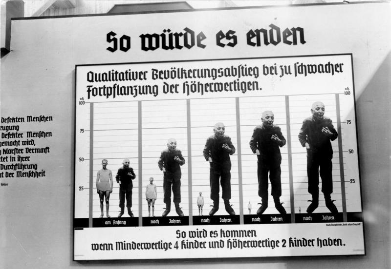 Die große Ausstellung "Das Wunder des Lebens" am Kaiserdamm in Berlin! So würde es enden! Ein interessantes statistisches Anschauungsobjekt auf der Ausstellung "Wunder des Lebens".